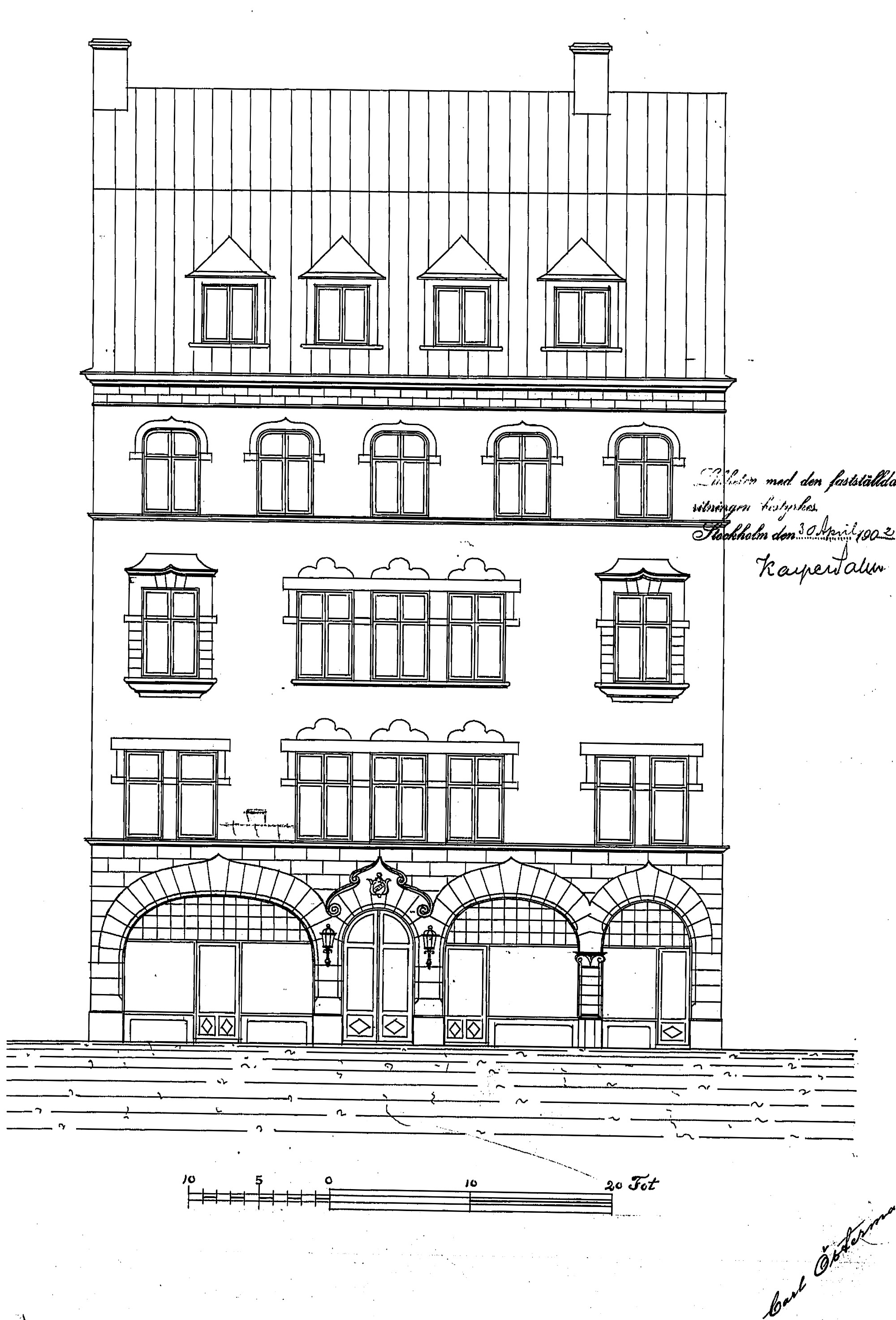 Stora Nygatan 36, fasad